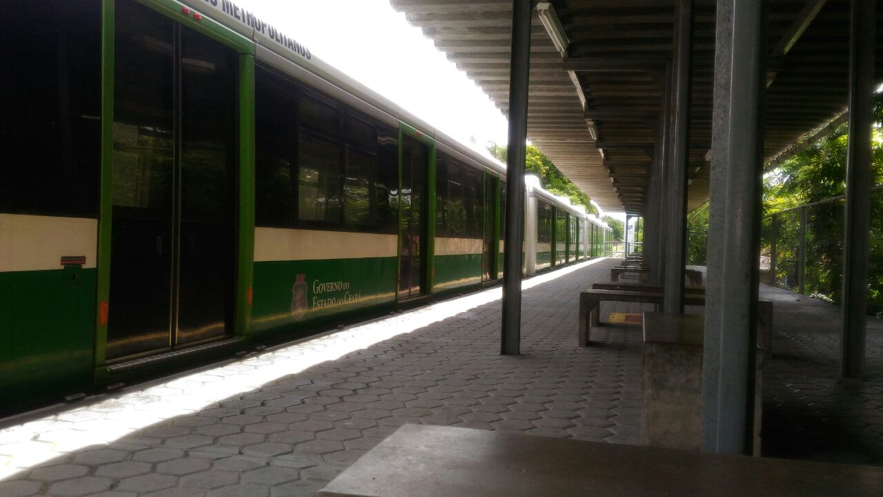 Plataforma da estação Caucaia pertencente a linha oeste do metrô de Fortaleza, atualmente em formato de VLT.